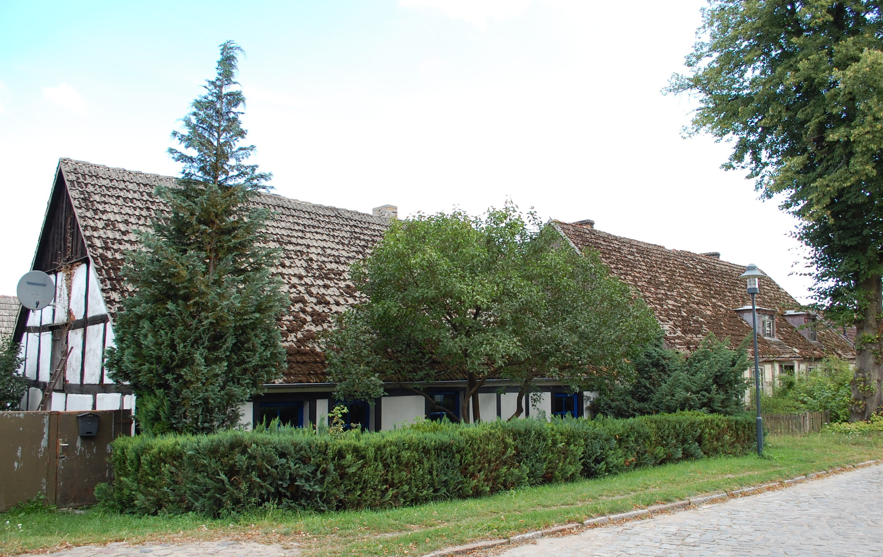 Häuser in der Ortsmitte von Annenwalde